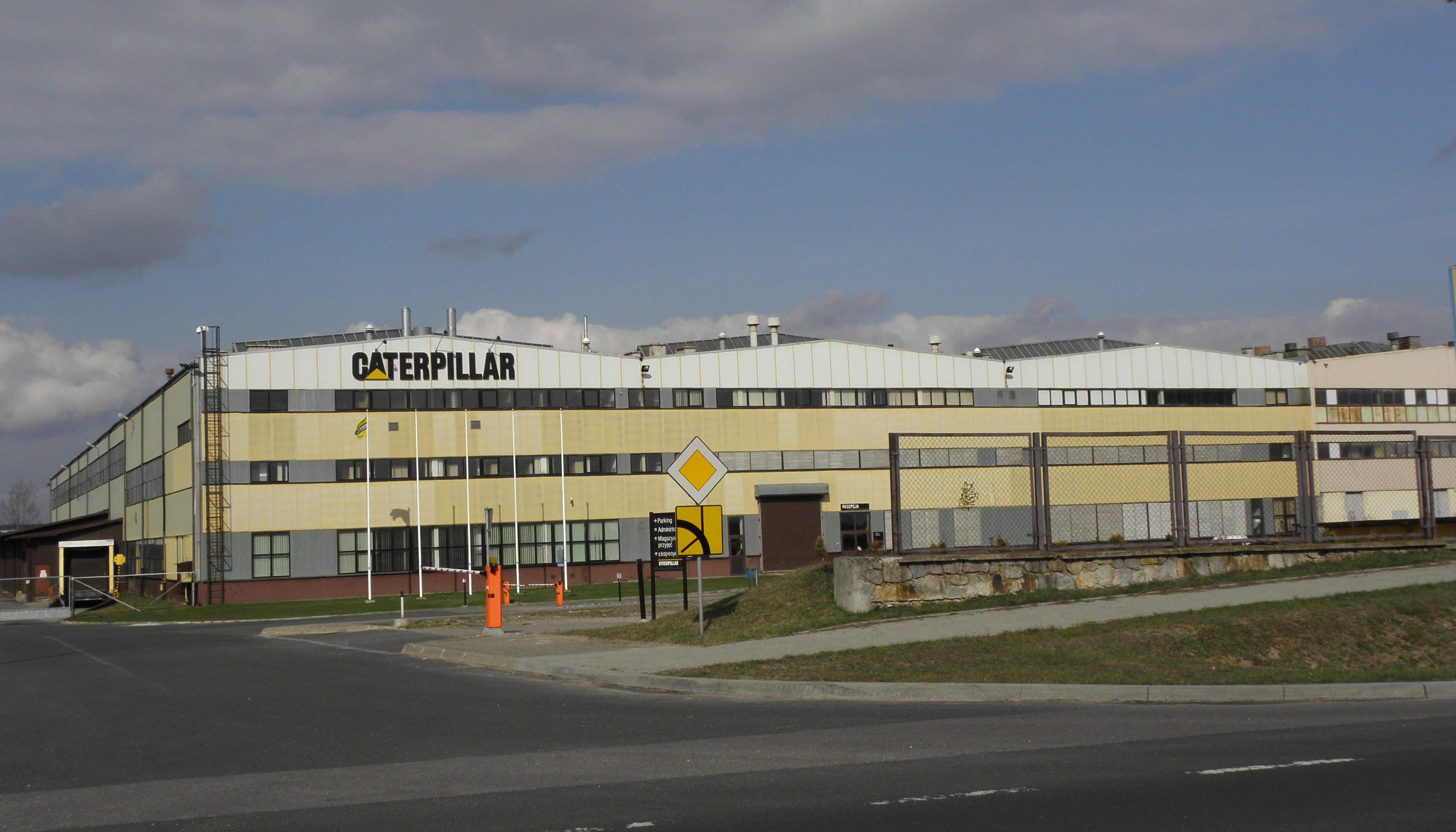 Janów Lubelski; Caterpillar Poland